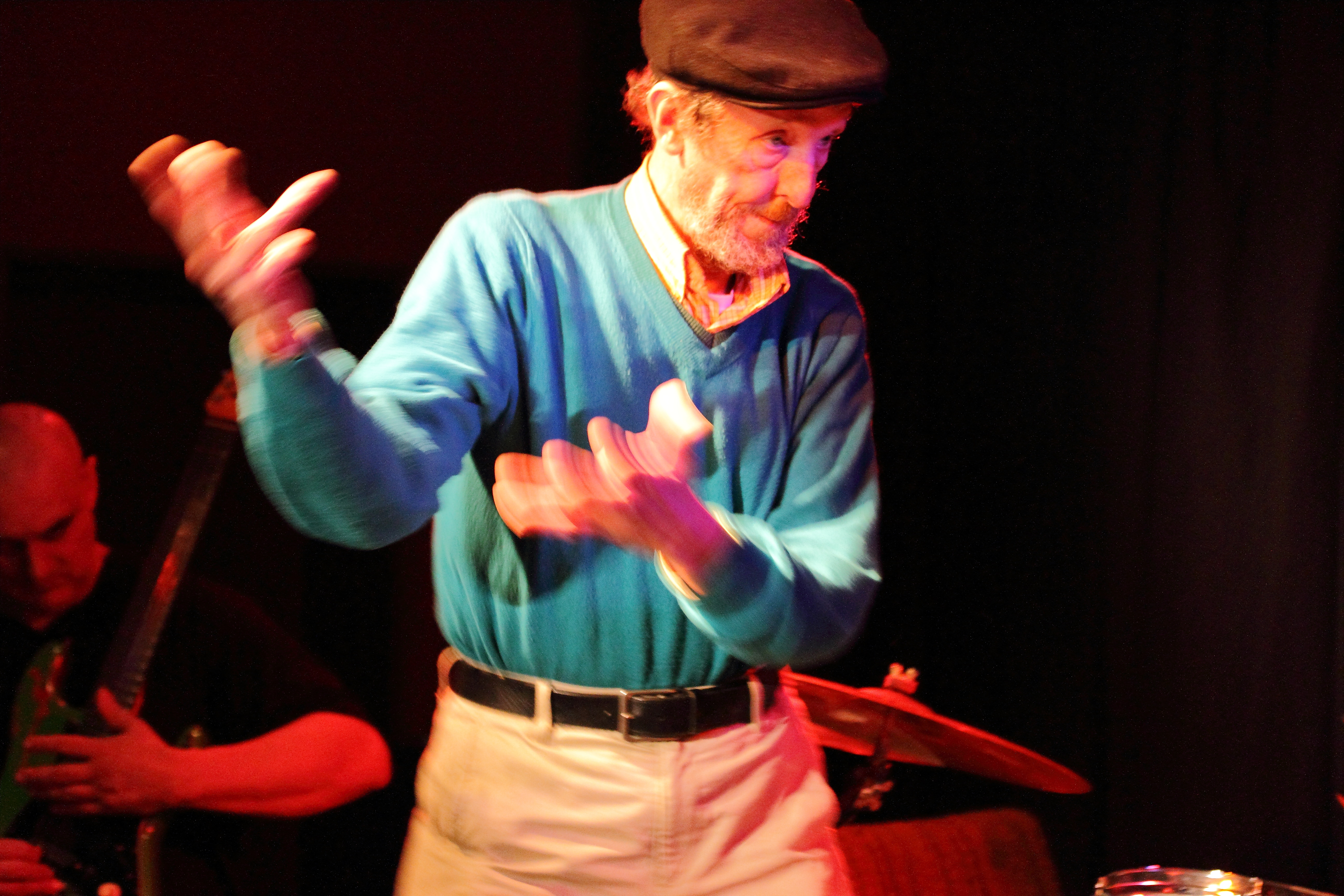 Tristan Honsinger (c) mit HDRS im Club W71, Weikersheim. Olaf Rupp an der Gitarre.